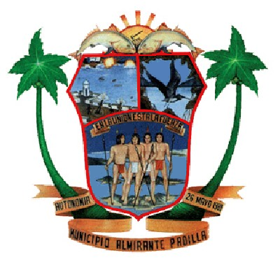 Escudo del municipio Almirante Padilla, estado Zulia, Venezuela